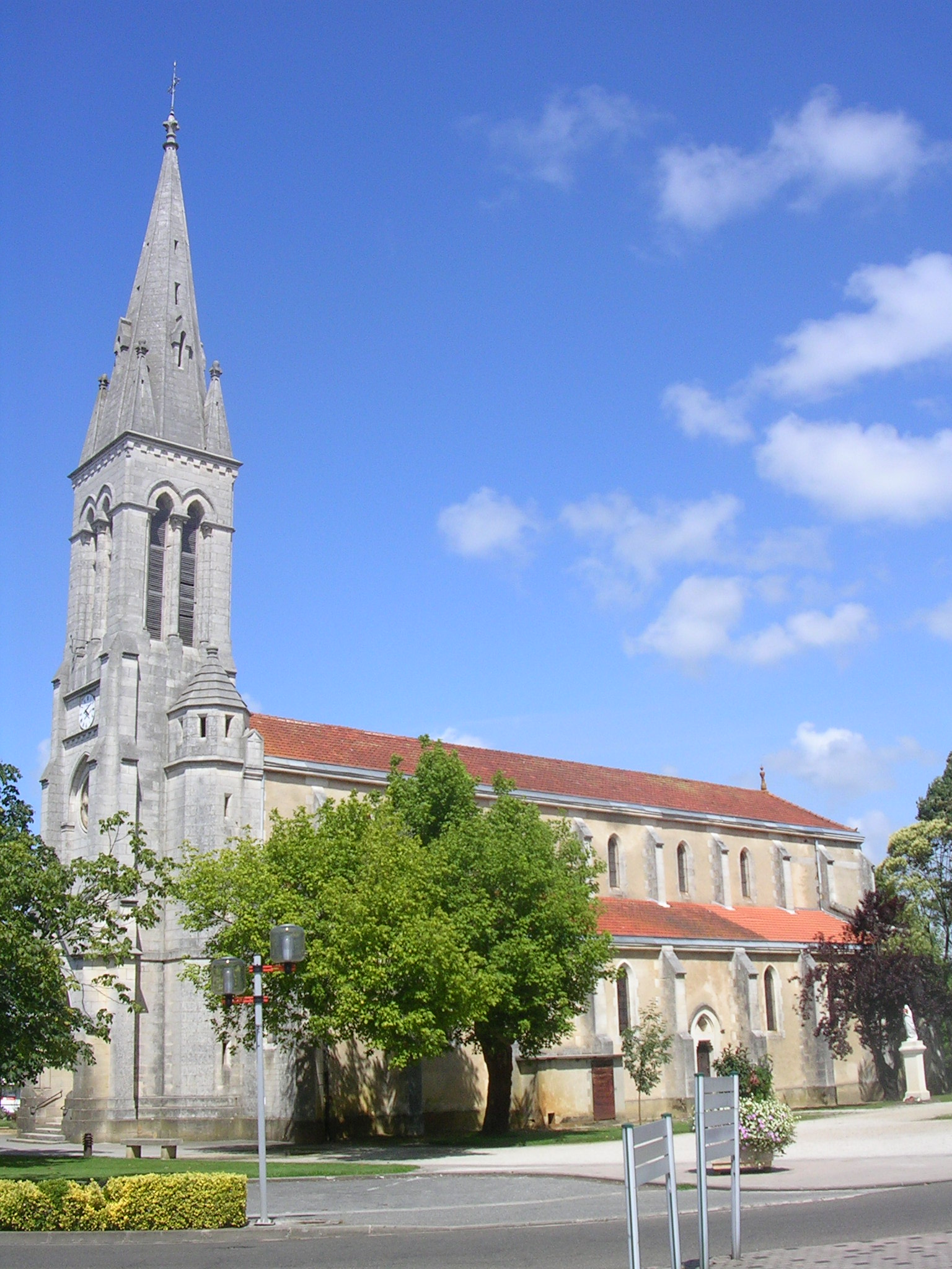 Église Notre-Dame de l'Assomption de Mimizan